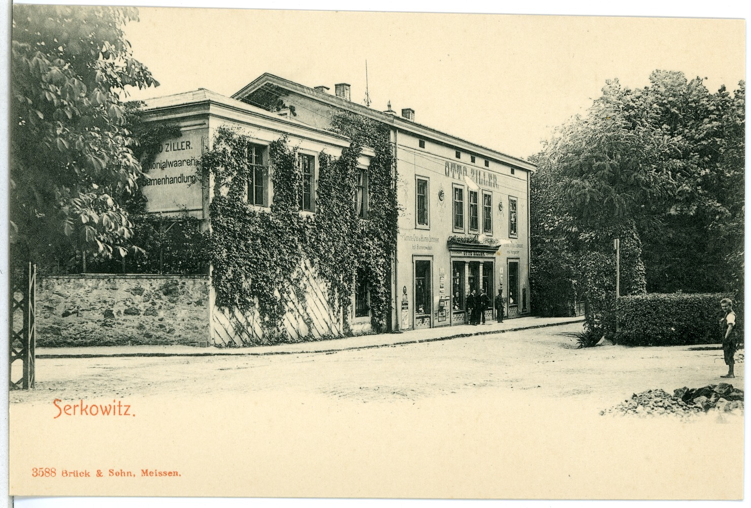 Serkowitz; Kolonialwaren Otto Ziller This postcard is from publisher Brück & Sohn in Meißen ( postcard has a unique number 03588 and is available in a higher resolution at the publisher. This images was uploaded in a cooperation project between Wikipedians and the publisher.